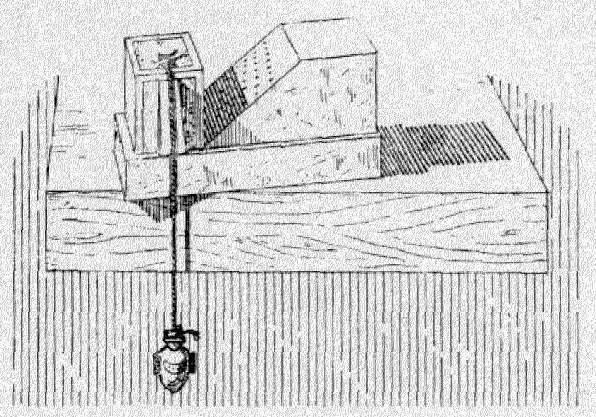 Altägyptische Streiflichtsonnenuhr (Typ Höhensonnenuhr)